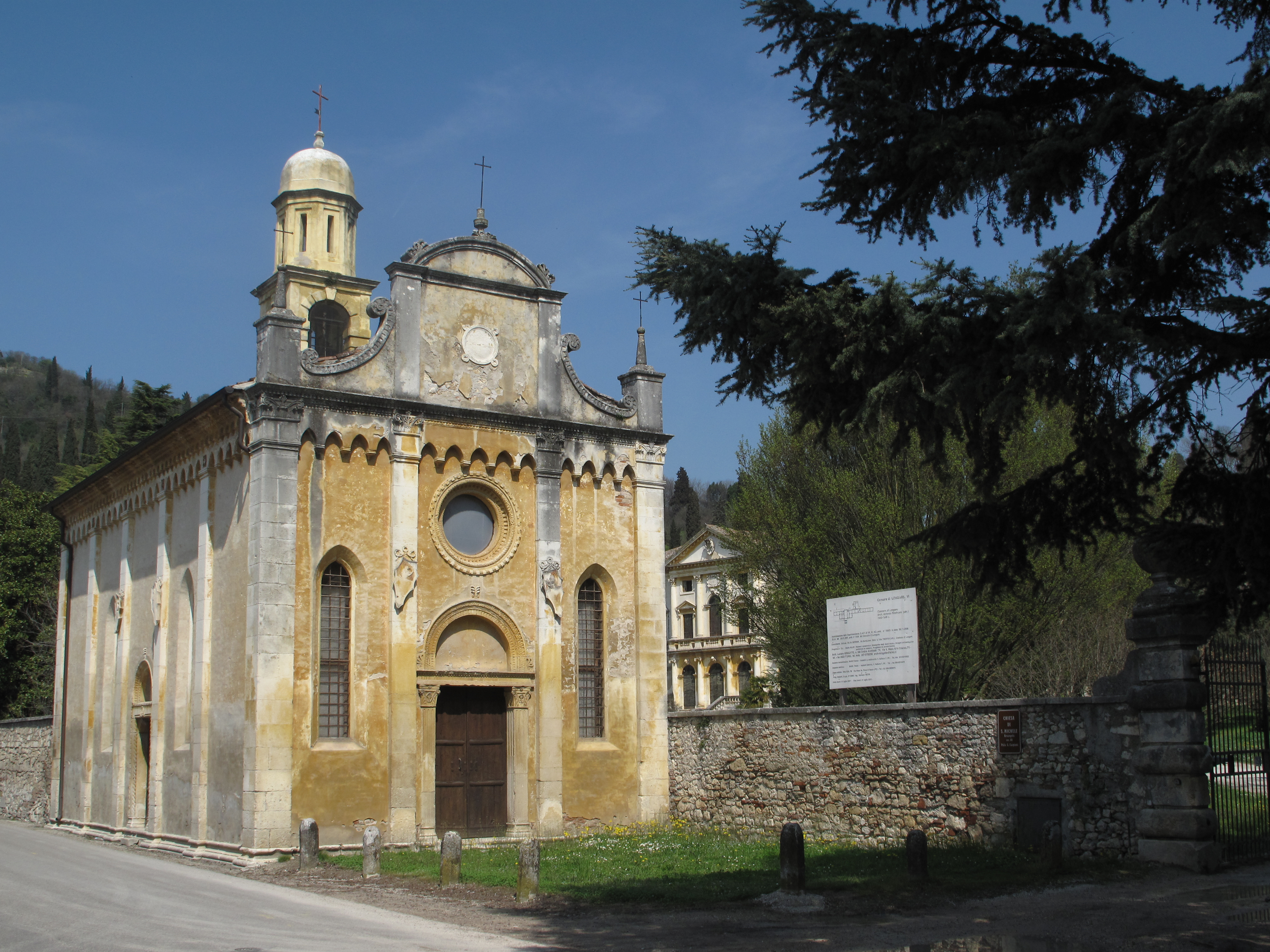 Costozza di Longare - Chiesa della Villa Trento Carli